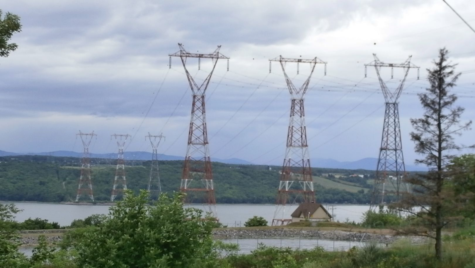 Trois des pylônes de 175 mètres de hauteur portant des lignes de 735 kV qui traversent le fleuve Saint-Laurent de Lévis à l'ile d'Orléans près de Québec. Ils furent construits au début des années 1960 et remplacèrent les 4 câbles sous-fluviaux entre la péninsule de Manicouagan et la station du village Les Boules sur la rive sud.